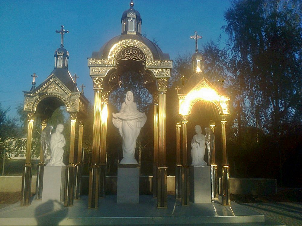 Збудована коштом місцевих мешканців і релігійних громад.